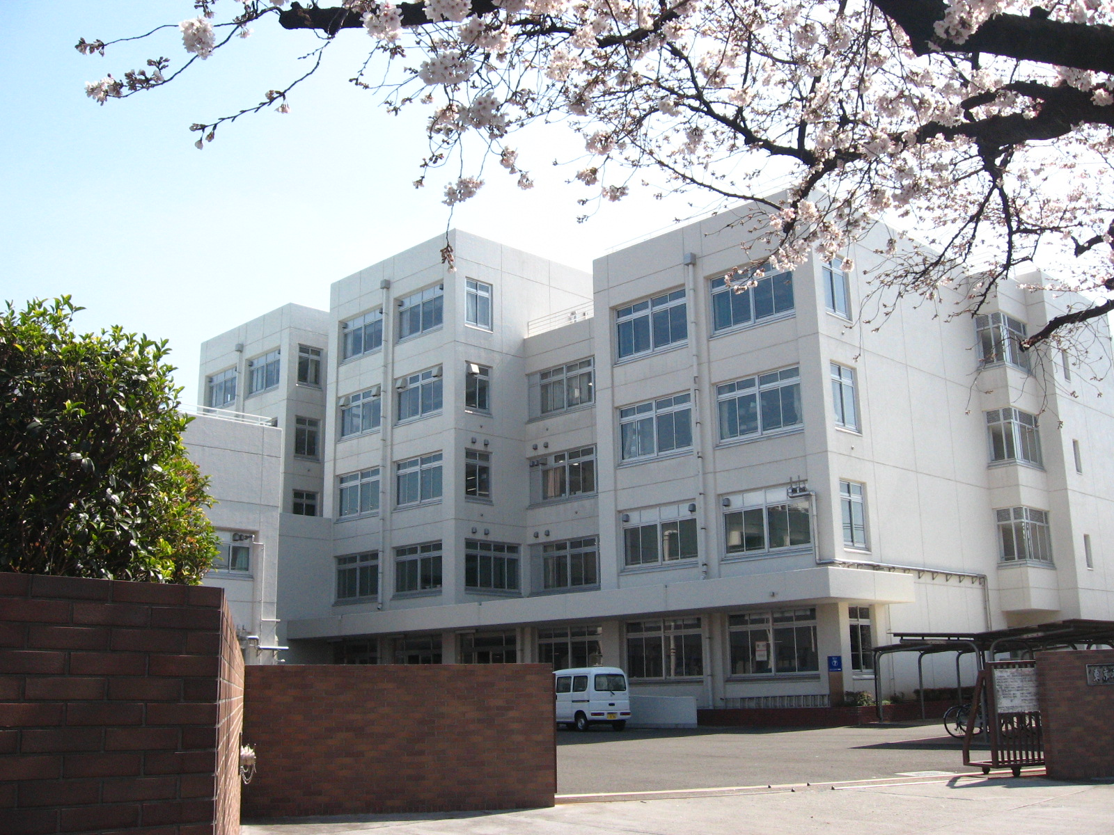 東京都立武蔵野北高等学校（東京都武蔵野市）の正門と校舎。